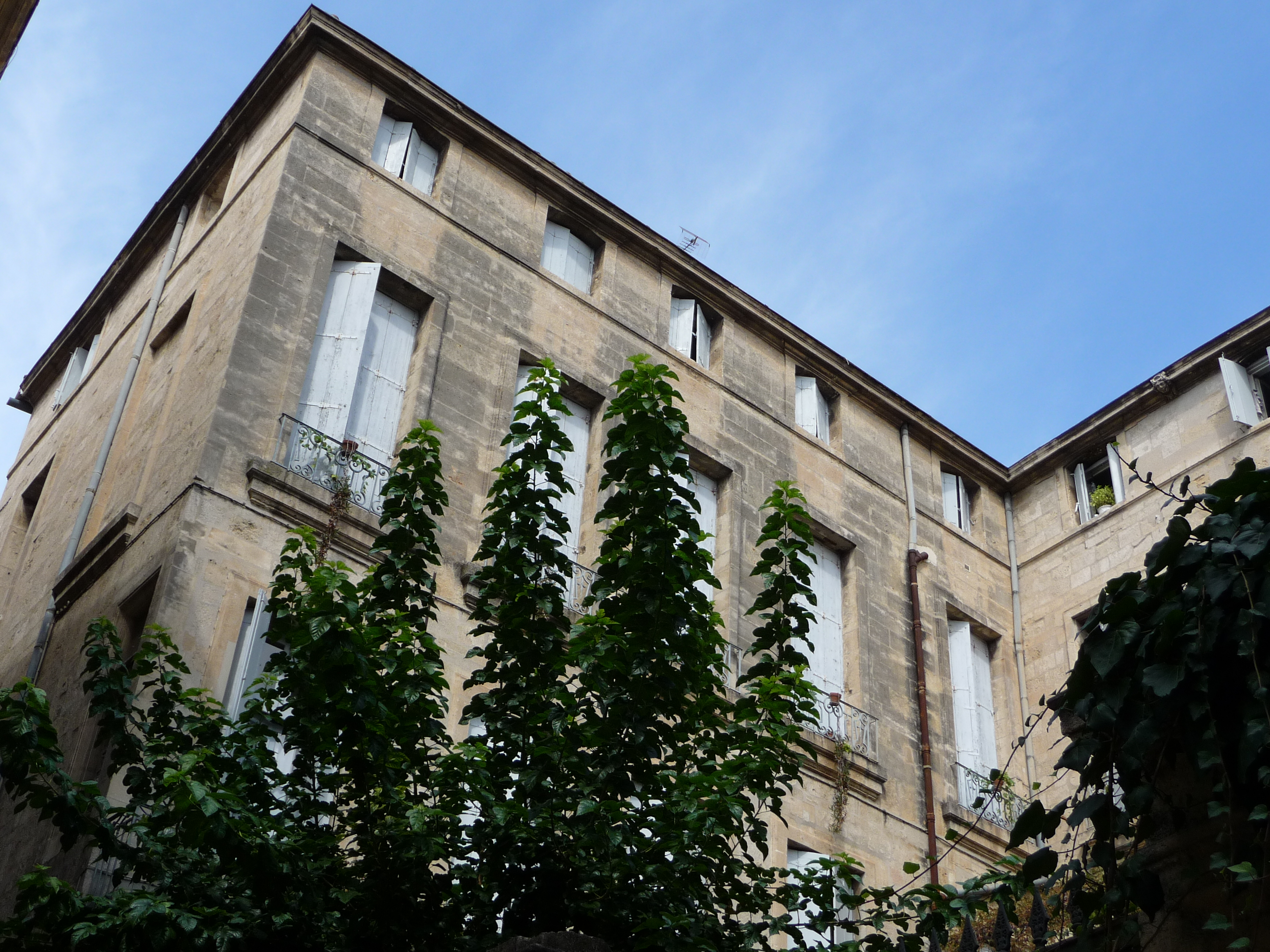 Façana de l'Hôtel de Montcalm (Montpeller) .